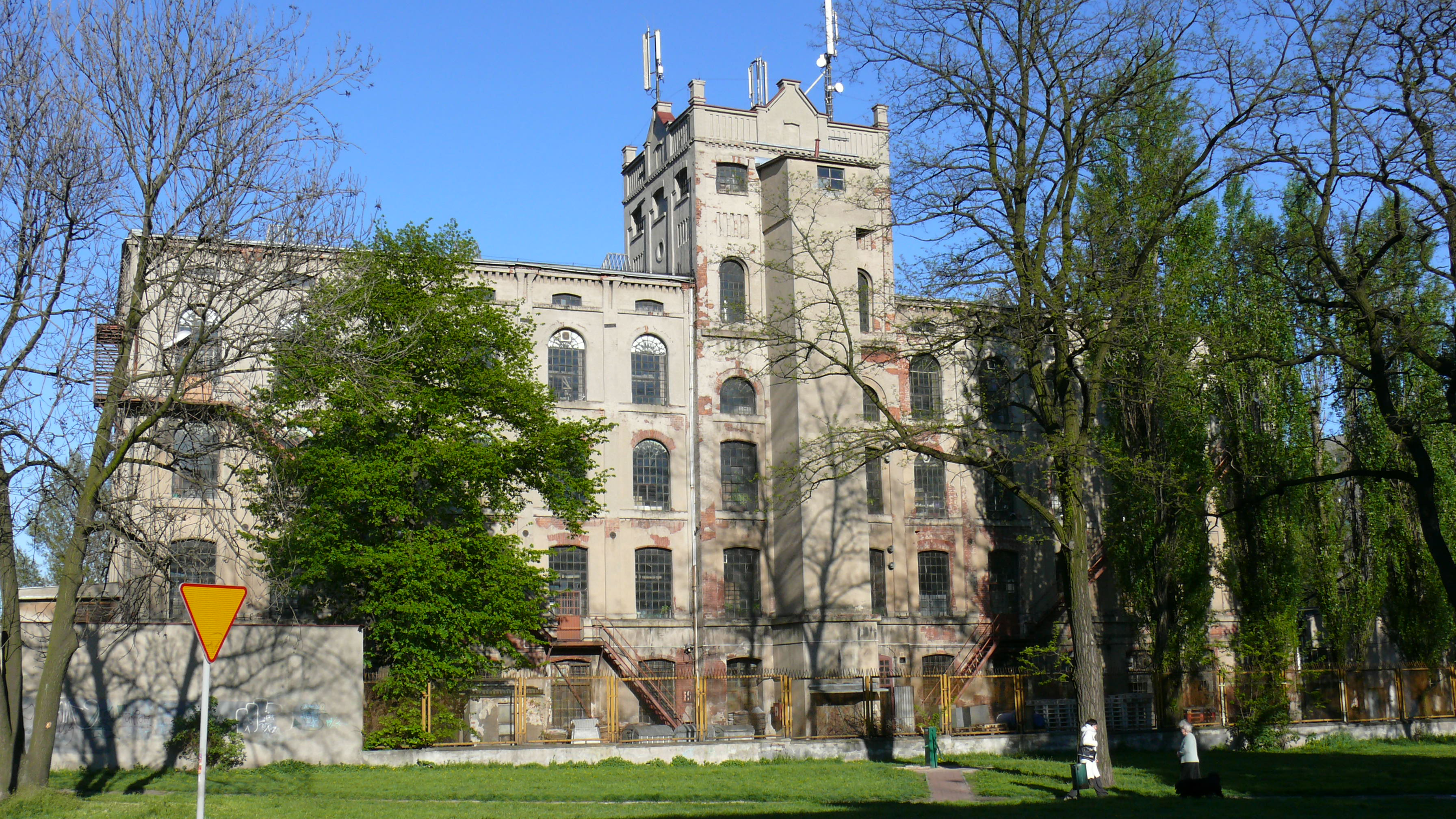 Fabryka Zygmunta Jarocińskiego przy ul. Targowej 28/30 w Łodzi